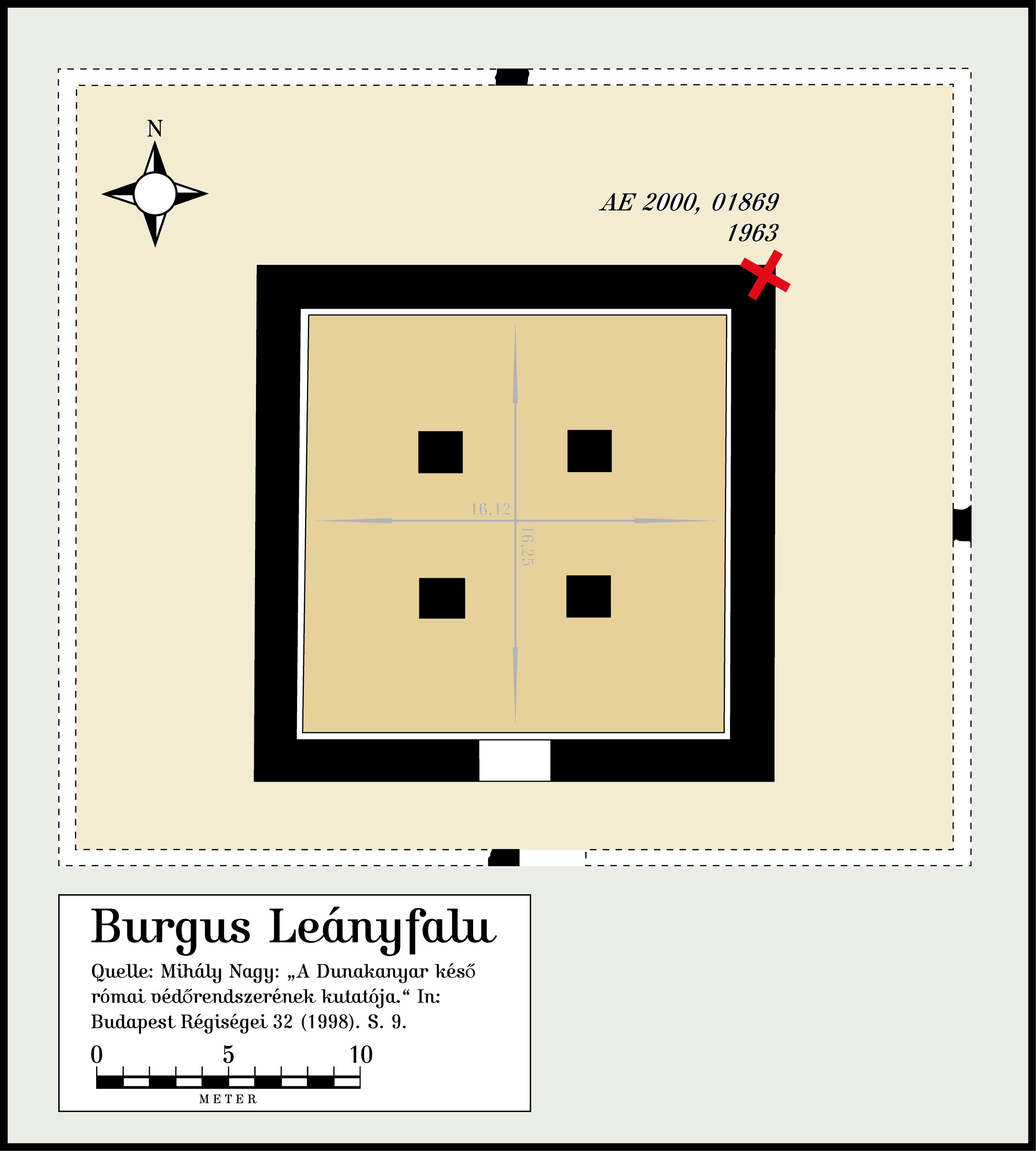 Das valentinianische Kleinkastell Leányfalu am Donaulimes wie es sich heute darstellt. Quellen zur selbsterstellten Zeichnung: Mihály Nagy: „A Dunakanyar késő római védőrendszerének kutatója.“ In: Budapest Régiségei 32 (1998). S. 9. Gezeichnet in FreeHand MX für Macintosh; abgespeichert in Adobe Photoshop CS.